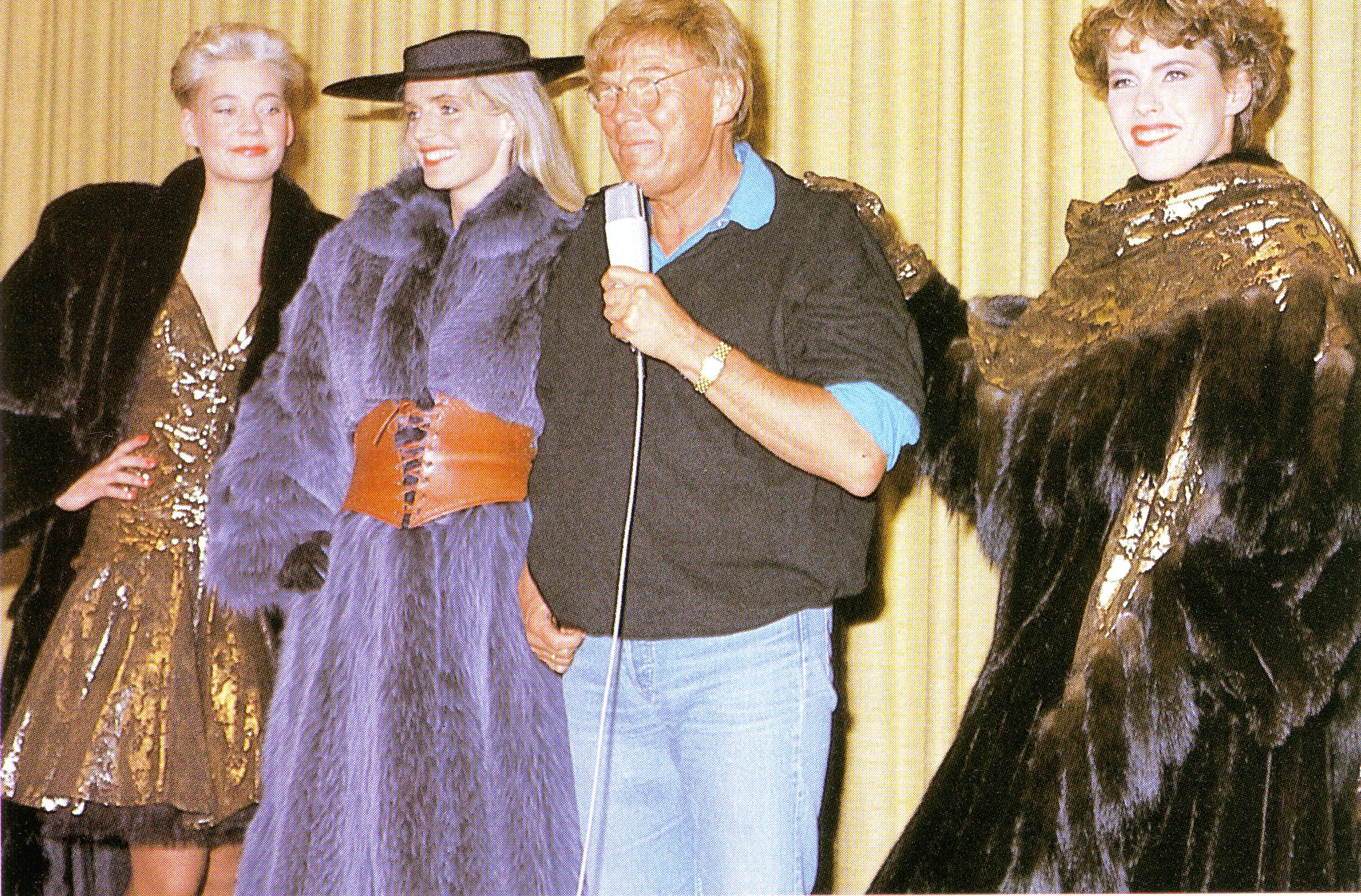 Kürschner-Modetreffen mit etwa 300 Teilnehmern im Saalbau in Essen, 1986. Eigentlich unter der Leitung von Dieter Zoern, Hamburg, dessen Flugzeug jedoch wegen einer Bombendrohung für seinen Flug aus Marokko verspätet, erst zum Ende der Veranstaltung ankam. Die Moderation übernahm stattdessen Obermeister Walter Schöne, Essen. Dieter Zoern mit seiner Kollektion.